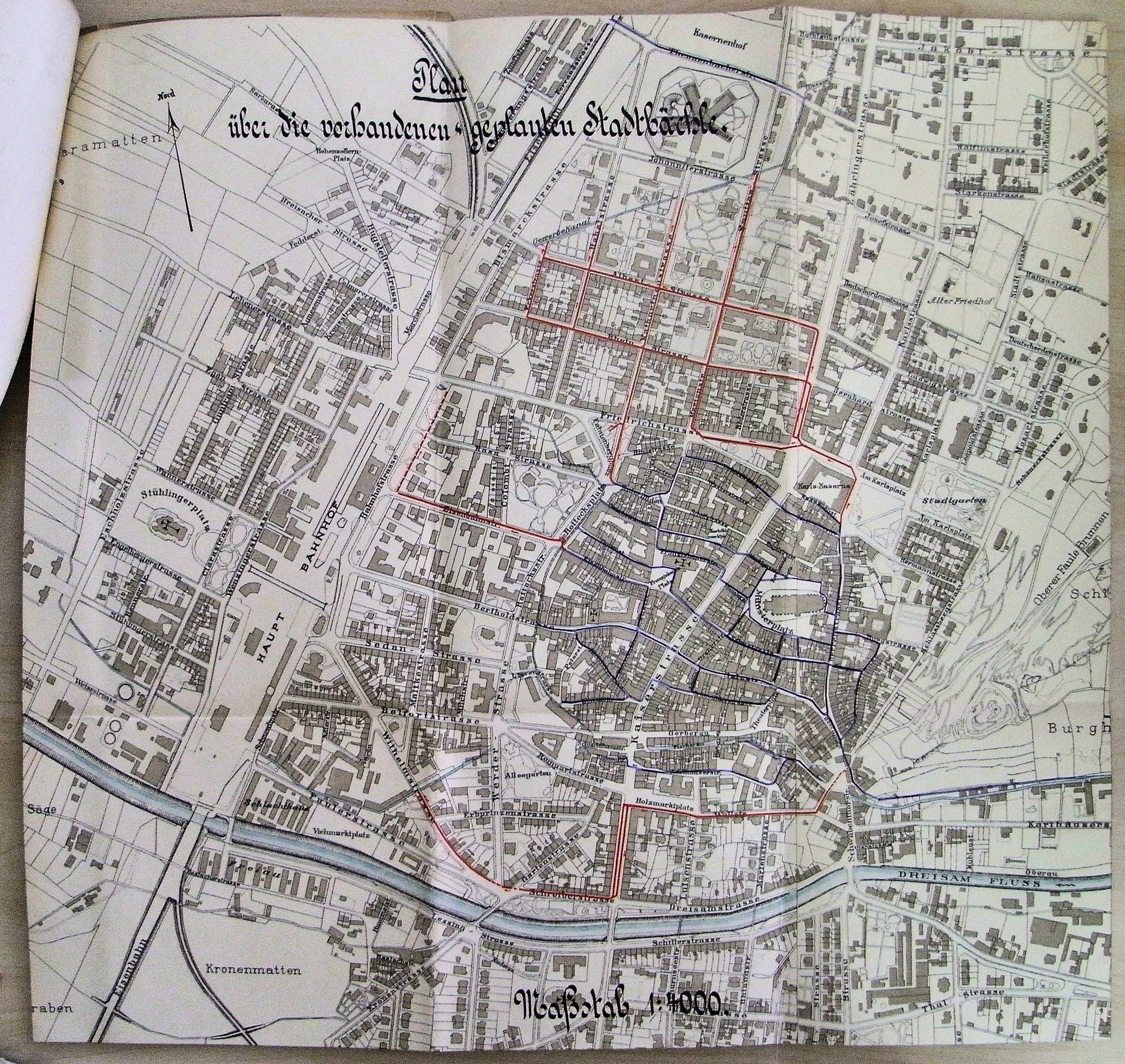 Amtliche Vorlage des Bauamts für den Stadtrat Freiburg Verlauf der vorhandenen und geplanten Bächle im Jahr 1905. Rot geplant, blau vorhanden.